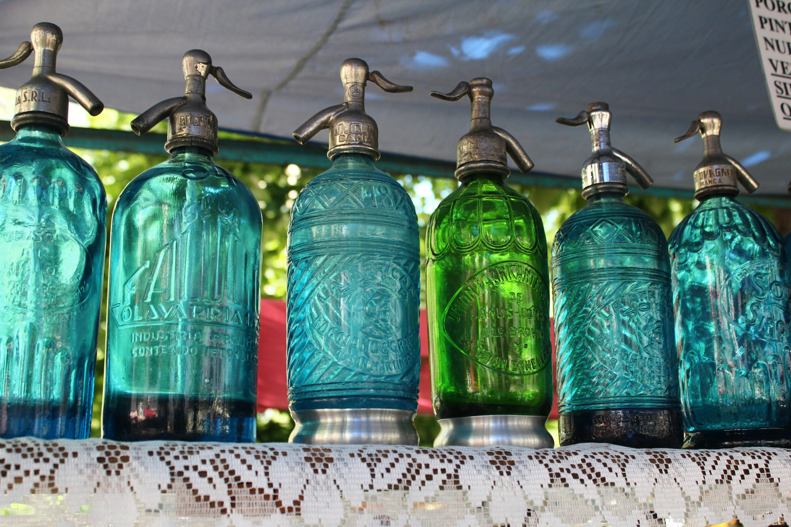 Sifões de soda. Feira de San Telmo, Buenos Aires, Argentina.